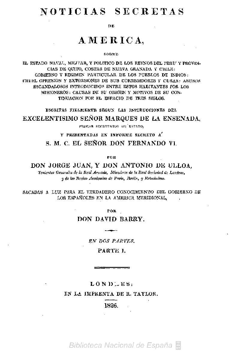 Noticias secretas de América sobre el estado naval, militar, y político de los reynos del Perú, y provincias de Quito, costas de Nueva Granada y Chile ... : Escritas fielmente segun las instrucciones del Excelentisimo Señor Marques de la Ensenada ... por Jorge Juan y Antonio de Ulloa ... ; sacadas á luz por Don David Barry ; en dos partes Autores: Juan, Jorge (1713-1773) ; Ulloa, Antonio de (1716-1795) Fecha: 1826 Datos de edición: Londres. En la Imprenta de R. Taylor